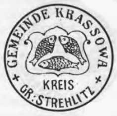 Altes Siegel bzw. Stempel der Gemeinde Krassowa im Kreis Groß Strehlitz.